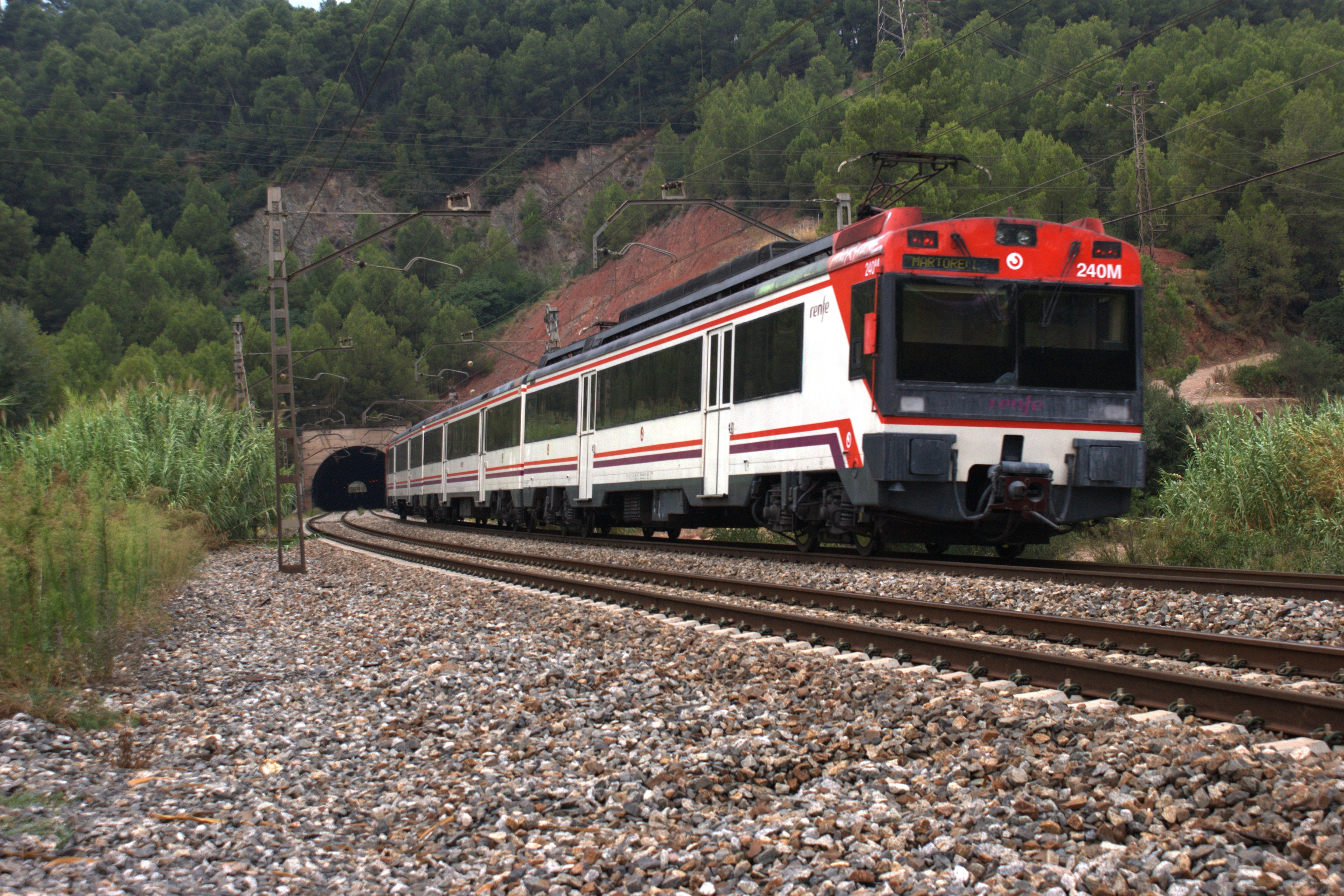 Una veterana 440R amb un servei de la R7 fent entrada al túnel que separa les estacions de Martorell i Castellbisbal.